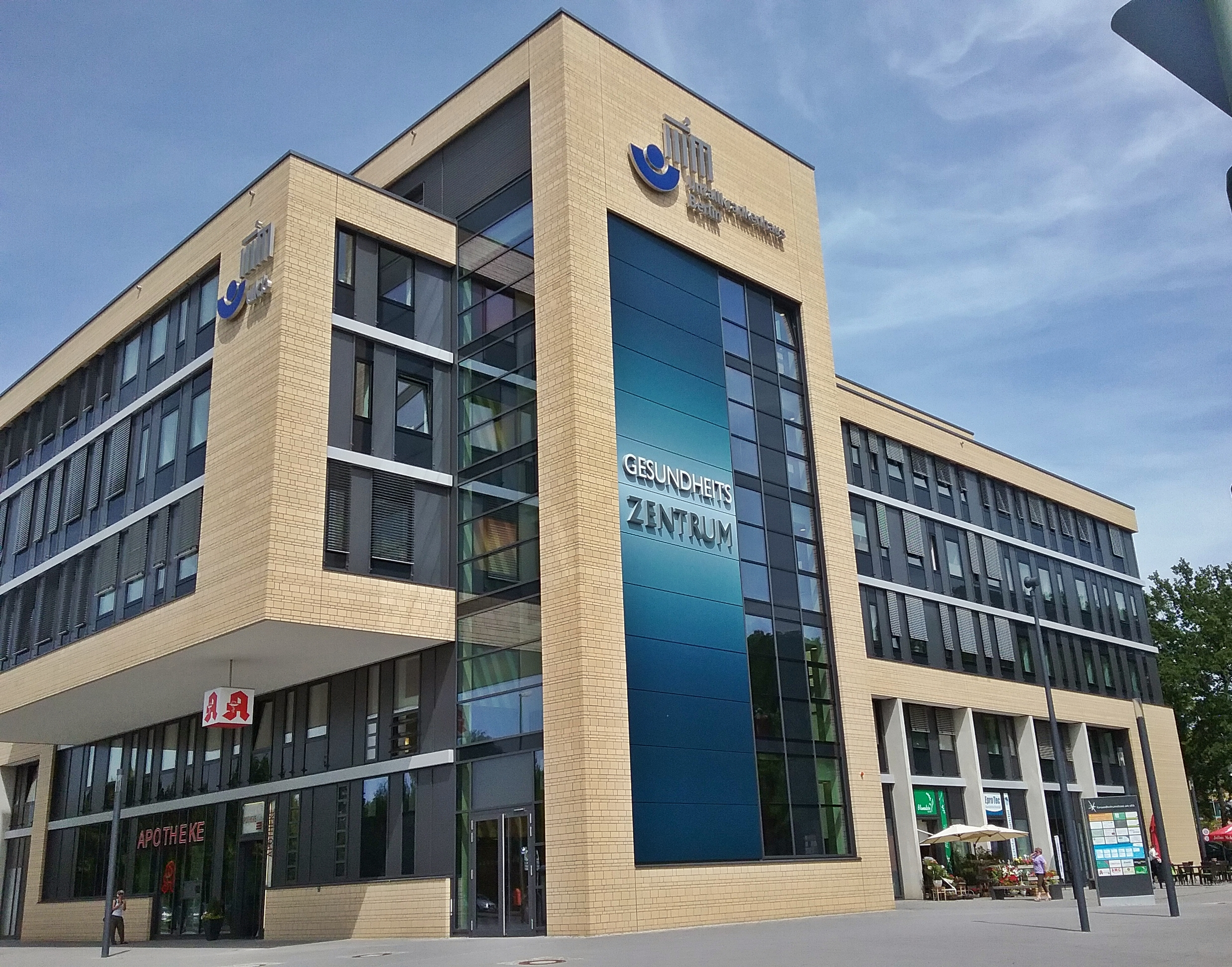 Gesundheitszentrum am UKB in Berlin-Biesdorf